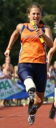 NK Estaffette 2006, Annette Roozen